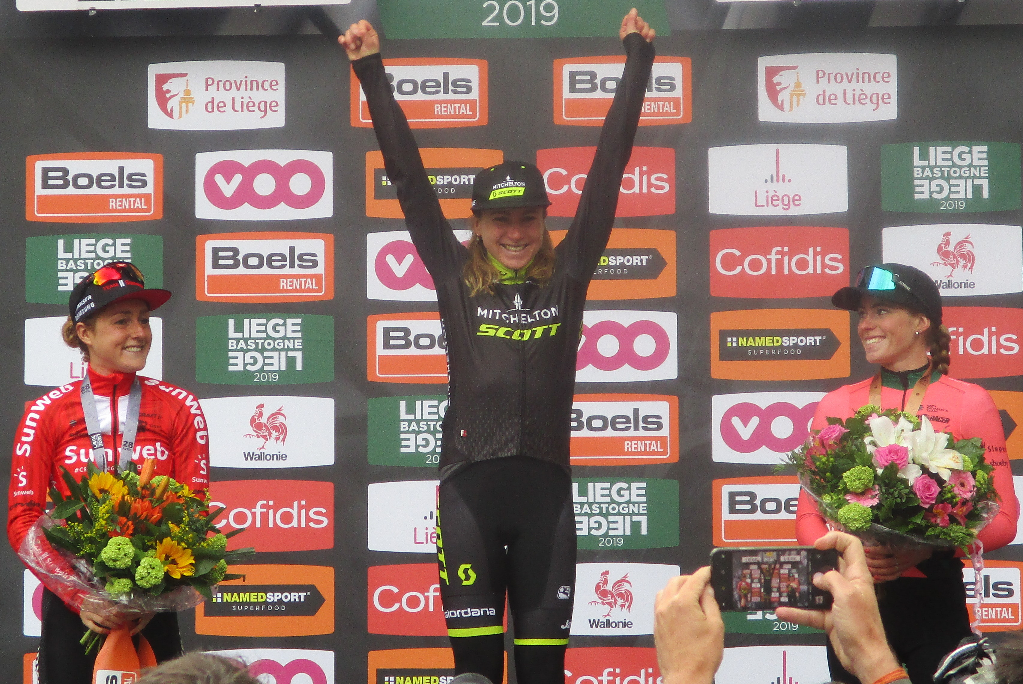 Podium van Luik-Bastenaken-Luik 2019 voor vrouwen: 1. Annemiek van Vleuten; 2. Floortje Mackaij; 3. Demi Vollering.